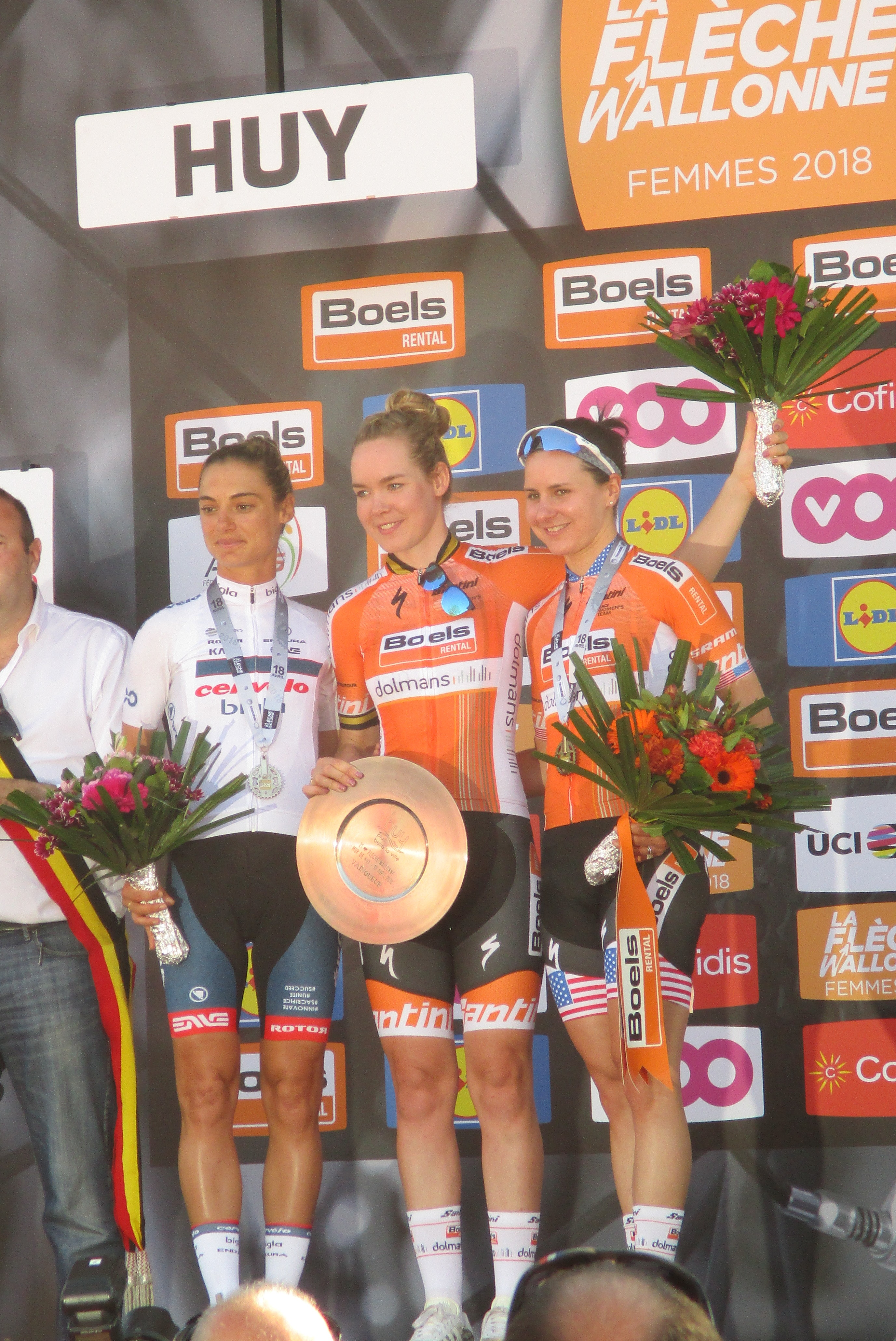 Waalse Pijl 2018 op de Mur van Huy. 1. Anna van der Breggen; 2. Ashleigh Moolman-Pasio; 3. Megan Guarnier